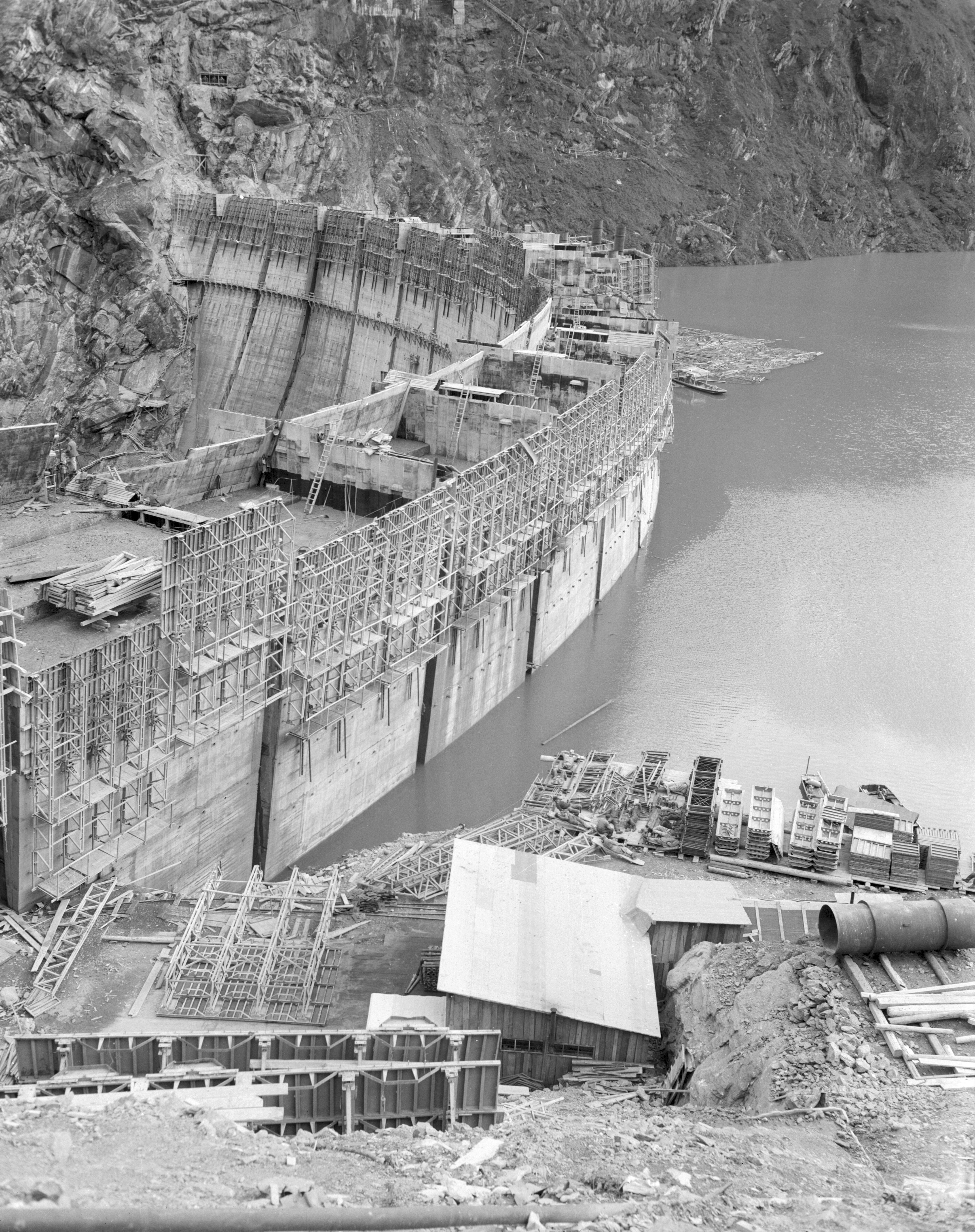 Kraftwerk Kaprun: Limbergsperre im Bau.